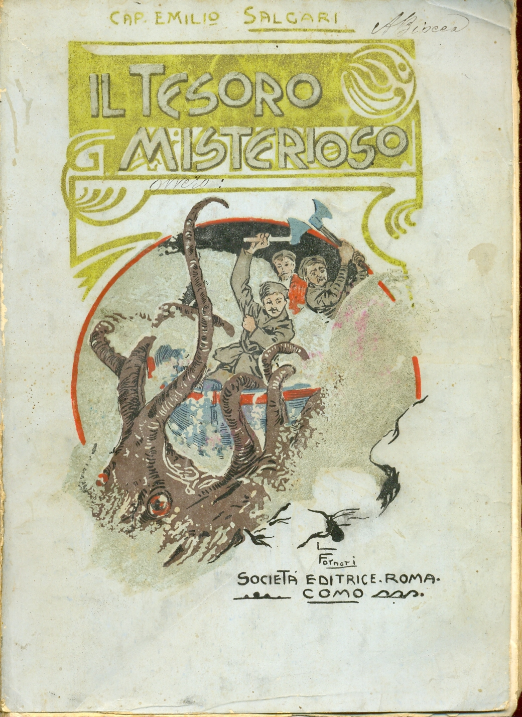 Copertina del romanzo di Emilio Salgari Il tesoro misterioso, 1907. Illustrazione di Luca Fornari.